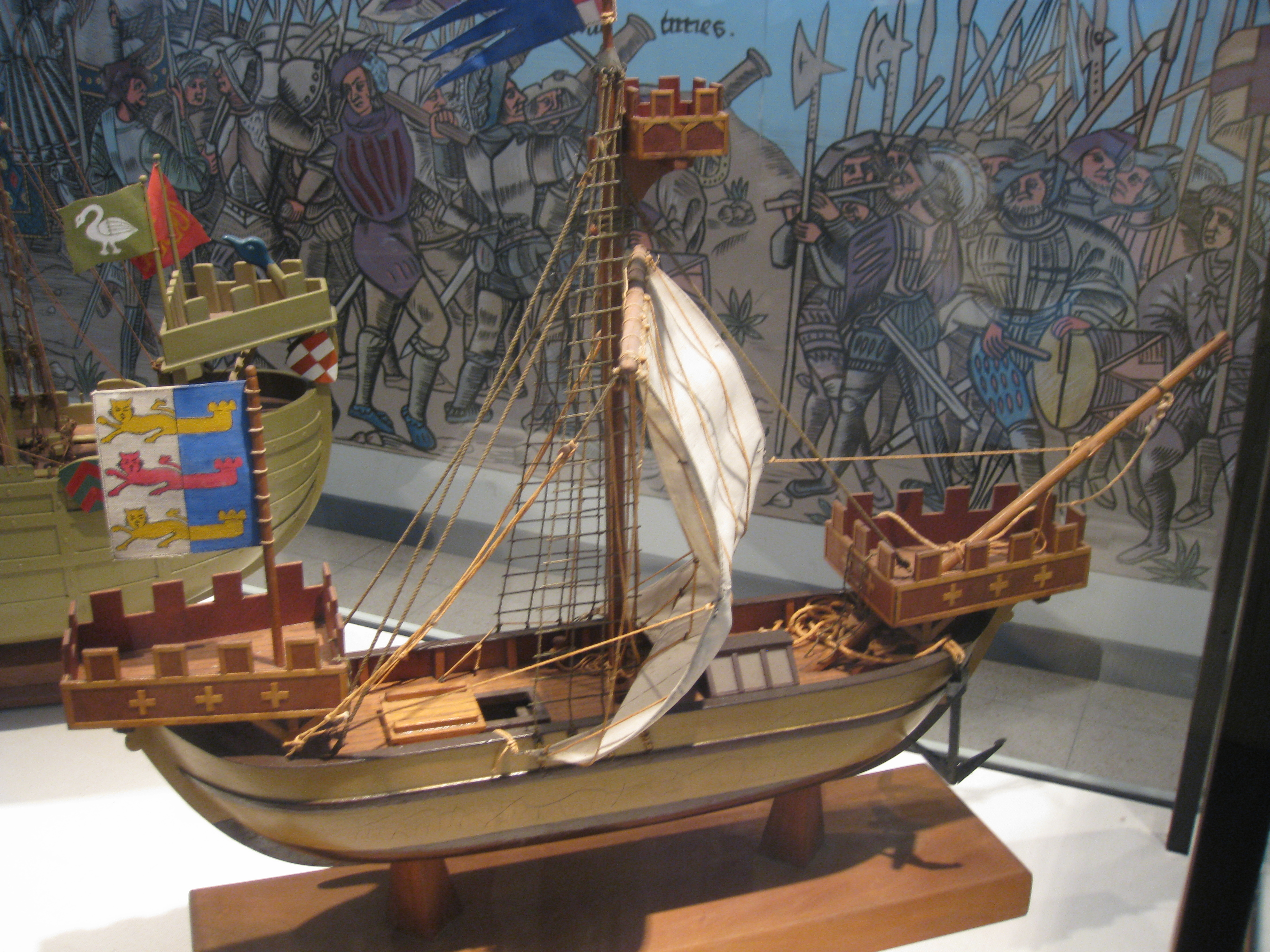 National Maritime Museum, Israel - Ship Models A modern model of a crusader warship (Cinques Ports type) from the 13th Century CE. wood. המוזיאון הימי הלאומי בחיפה דגמי ספינות דגם של ספינת מלחמה צלבנית (מדגם "חמשת הנמלים") מהמאה ה-13. הדגם עשוי עץ